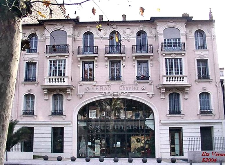 Lee établissements Veran au 7 bd Carabacel.